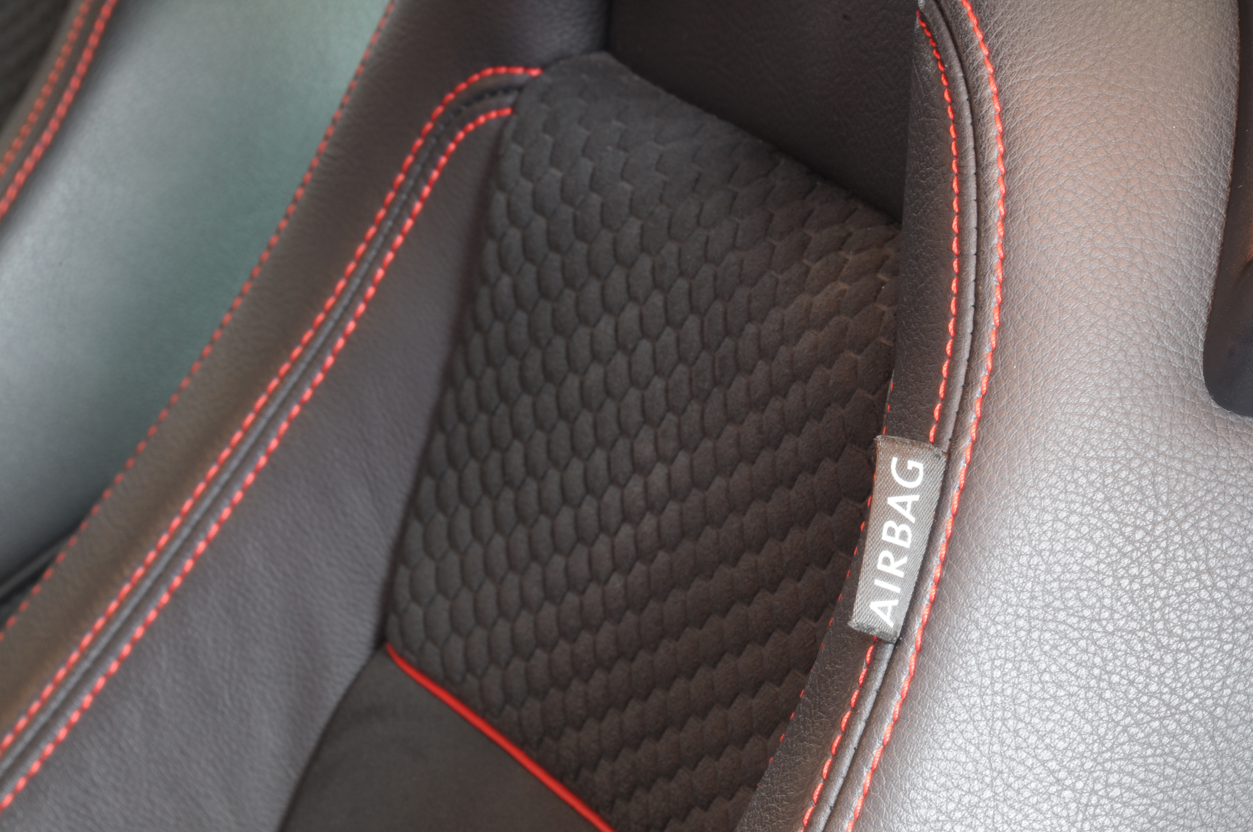 Detail Volkswagen